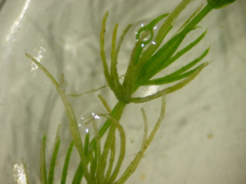 Armleuchteralge Chara globularis